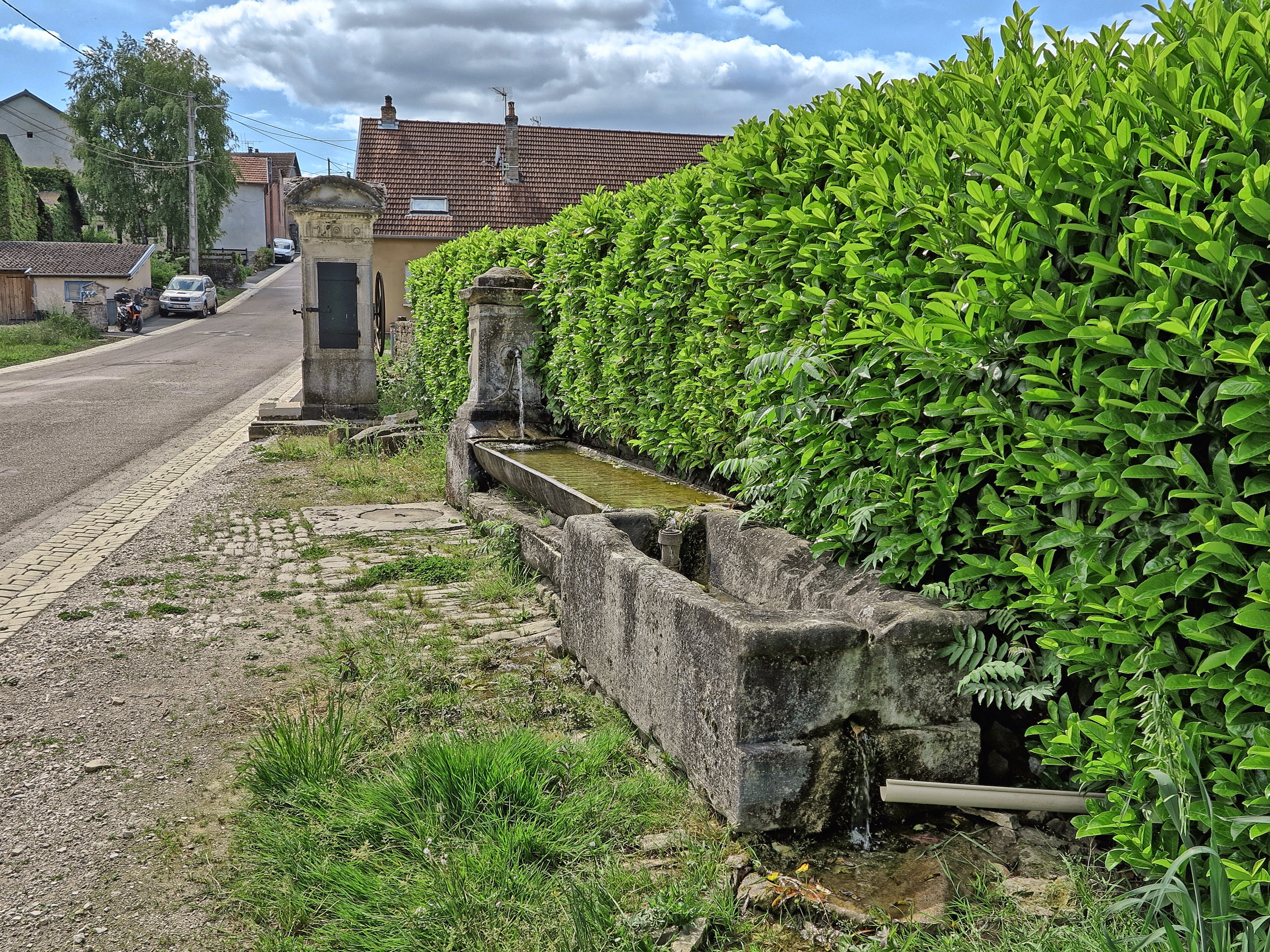 La fontaine-abreuvoir